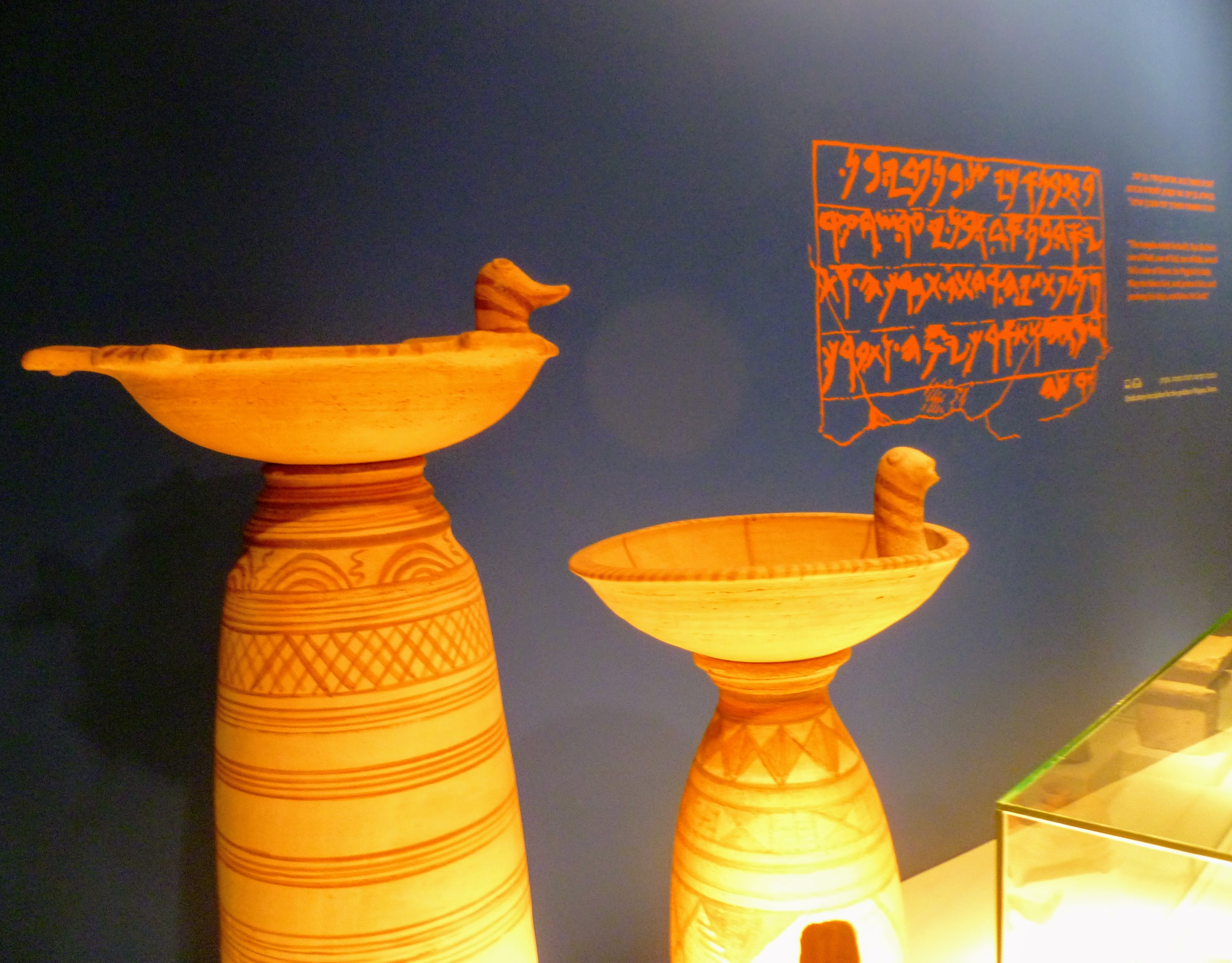 מוצגים בתערוכה